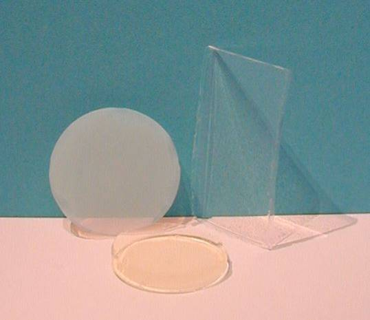 Aérogel de silice. Auteur : Frédéric Chaput. Licence GFDL Frédéric Chaput